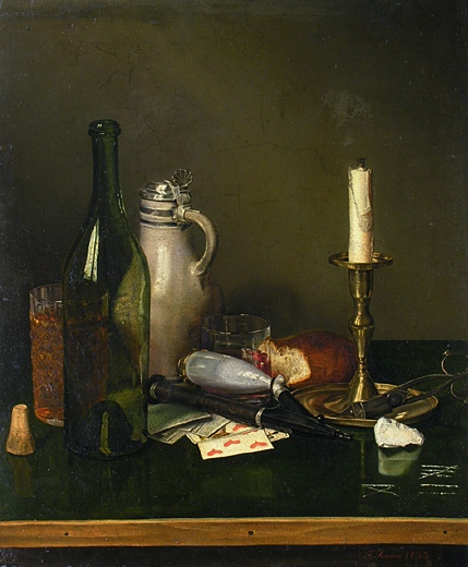 Stillleben mit Kerze, Dochtschere, Flasche, Glas, Krug, Spielkarten, Pfeife u. a.; Öl auf Leinwand. 54 x 45 cm